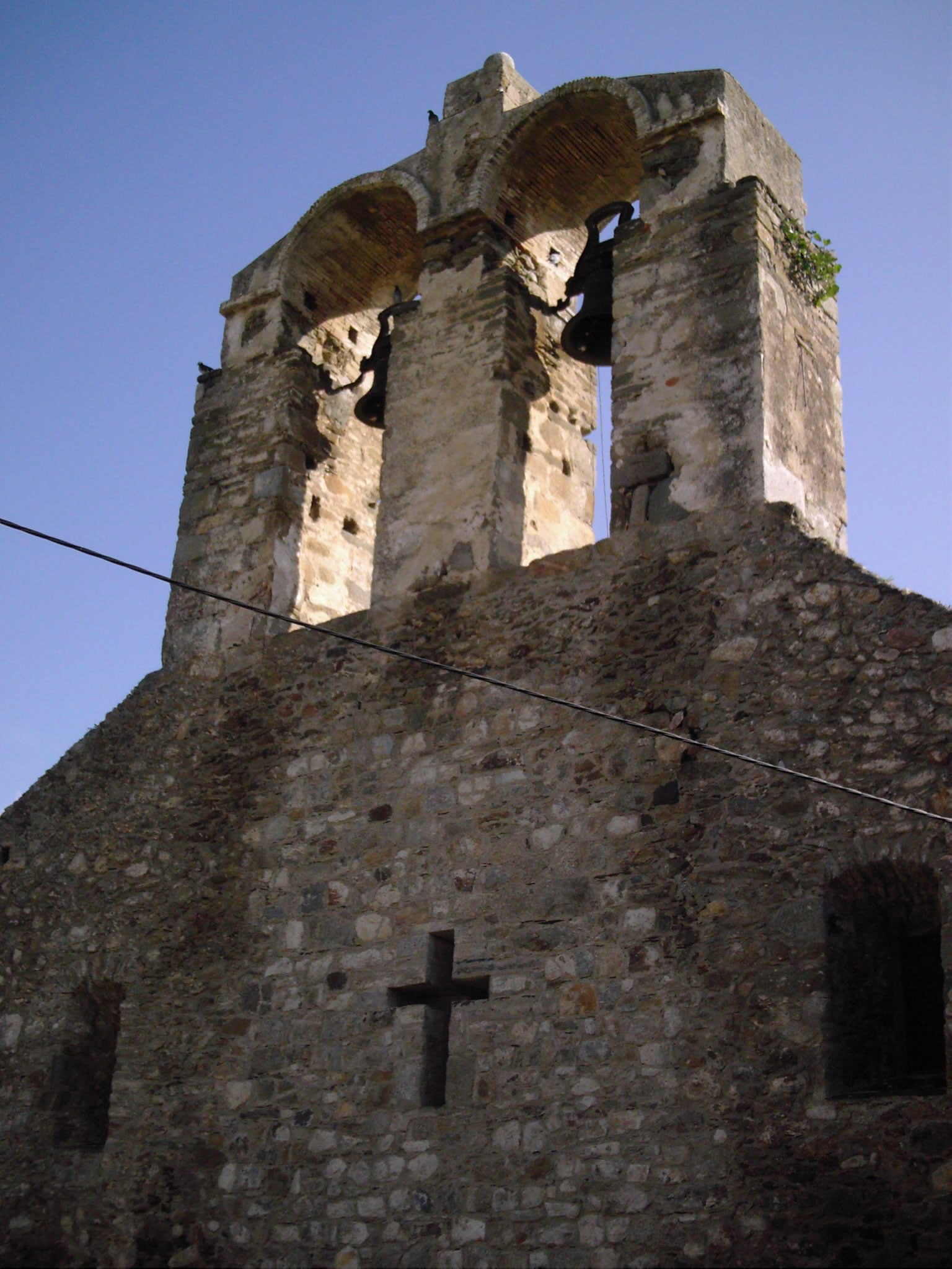 église st Joan à Palau Saverdera